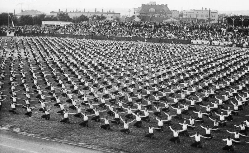 1937 Ósmy ogólnopolski zlot Towarzystwa Gimnastycznego "Sokół" w Katowicach zorganizowany w 70 rocznicę utworzenia sokolstwa polskiego i 15 rocznicę powrotu Śląska do Macierzy Polskiej. Fragment pokazów gimnastycznych.